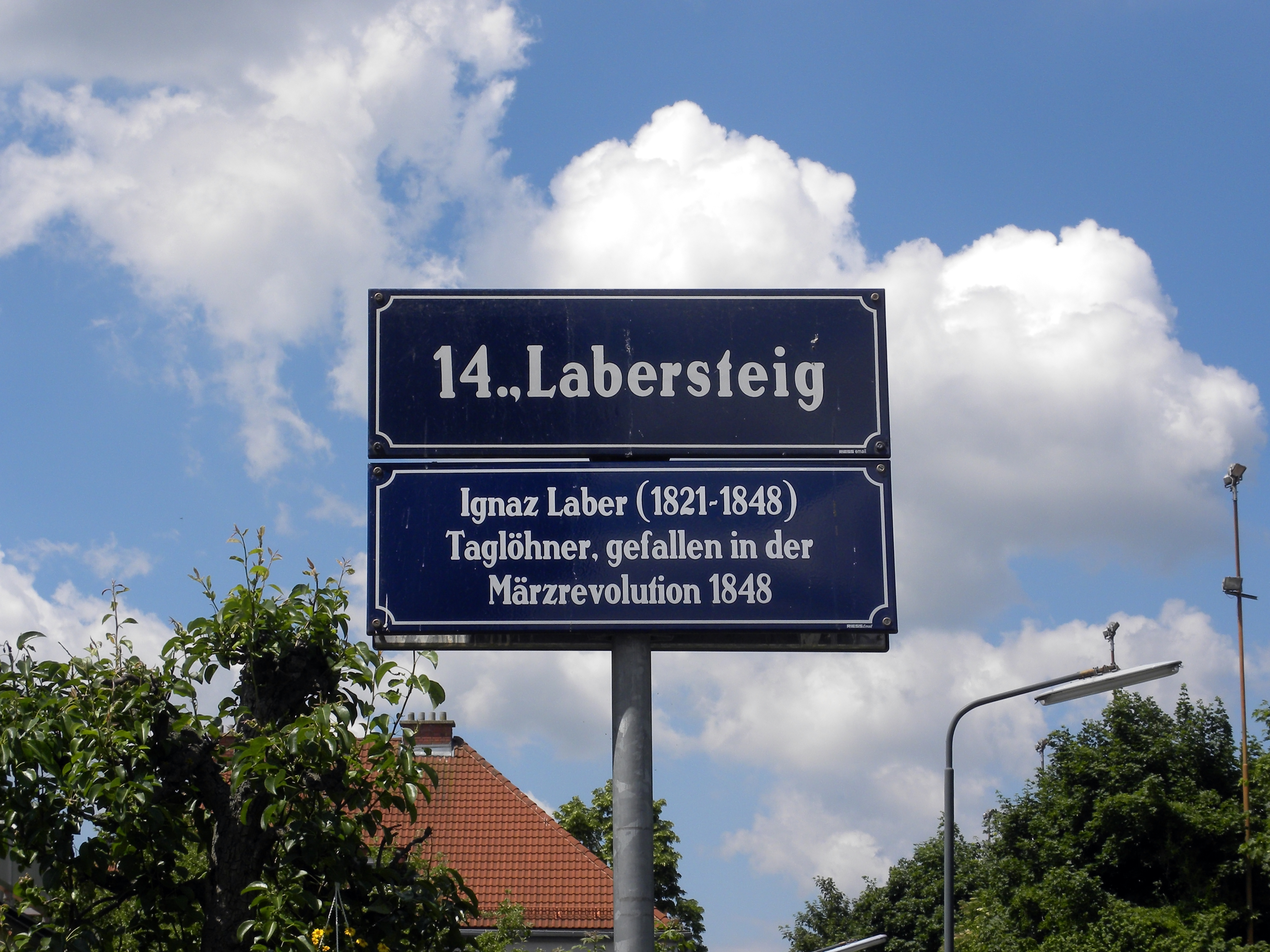 Die Straßen, Gassen und Wege rund um den an die Opfer der Märzrevolution von 1848 erinnernden Achtundvierzigerplatz in Wien Penzing, Breitensee, sind nach Gefallenen der Märzrevolution benannt.